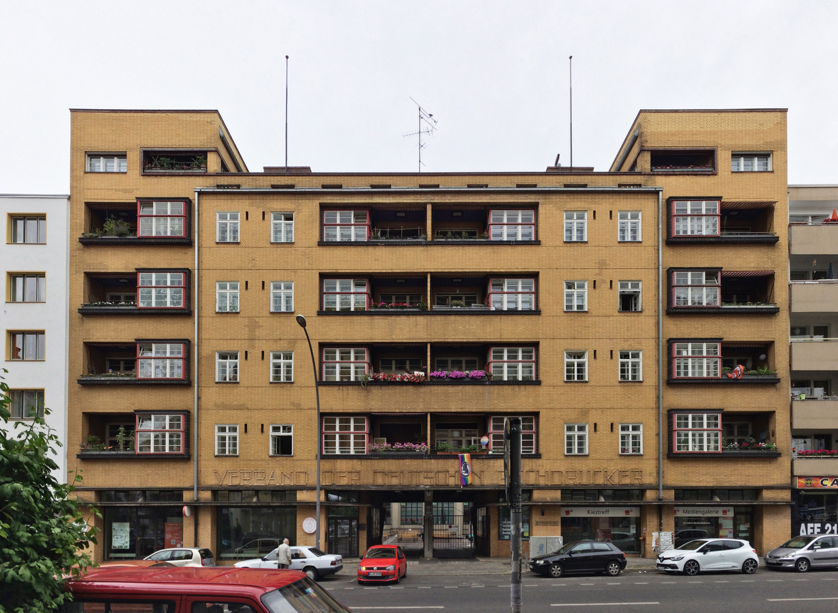 Ehemaliges Verbandshaus der Deutschen Buchdrucker, Dudenstraße, Berlin-Kreuzberg, 1924–1926, Entwurf Max Taut und Karl Bernhard, Ausführung Franz Hoffmann